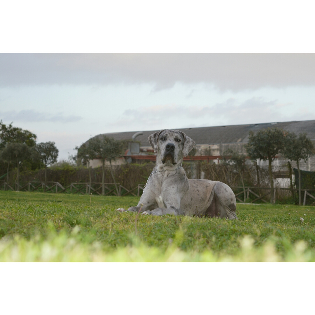 greatdane